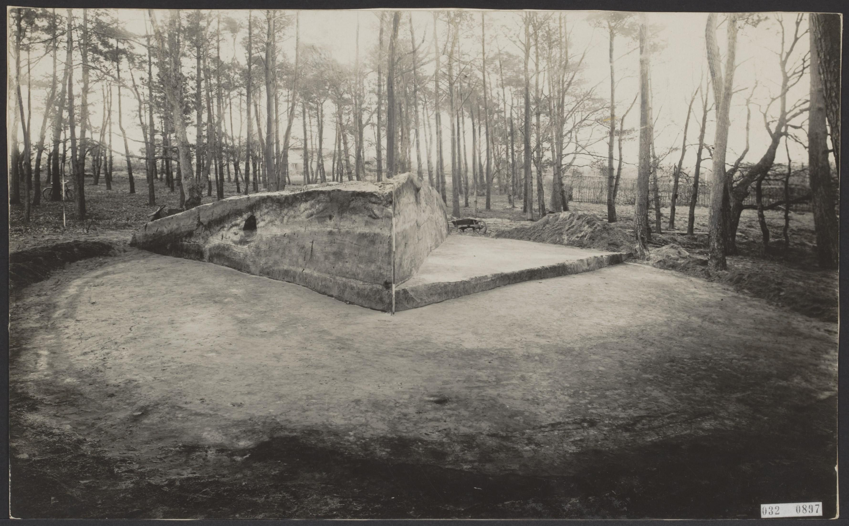 Drente: Heuvelgraf, opgegraven dmv de kwadrant methode ontworpen door prof. Van Giffen. (Mogelijk het Noordse Veld bij Zeijen?)